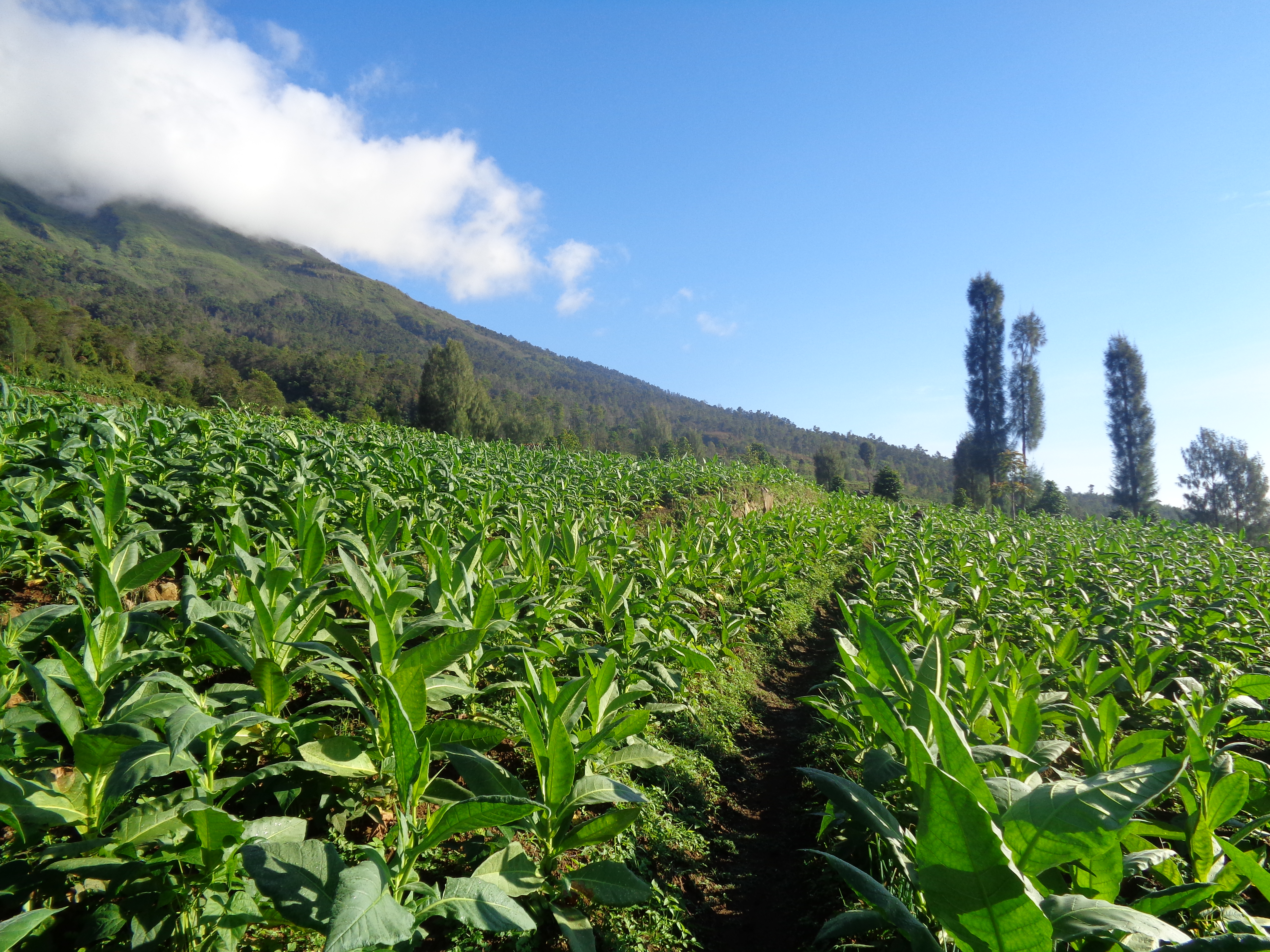 Indahnya dan hijaunya perkebunan tembakau di lereng Gunung Sumbing, Temanggung, Jawa Tengah sungguh menawan dan menyejukkan hati.